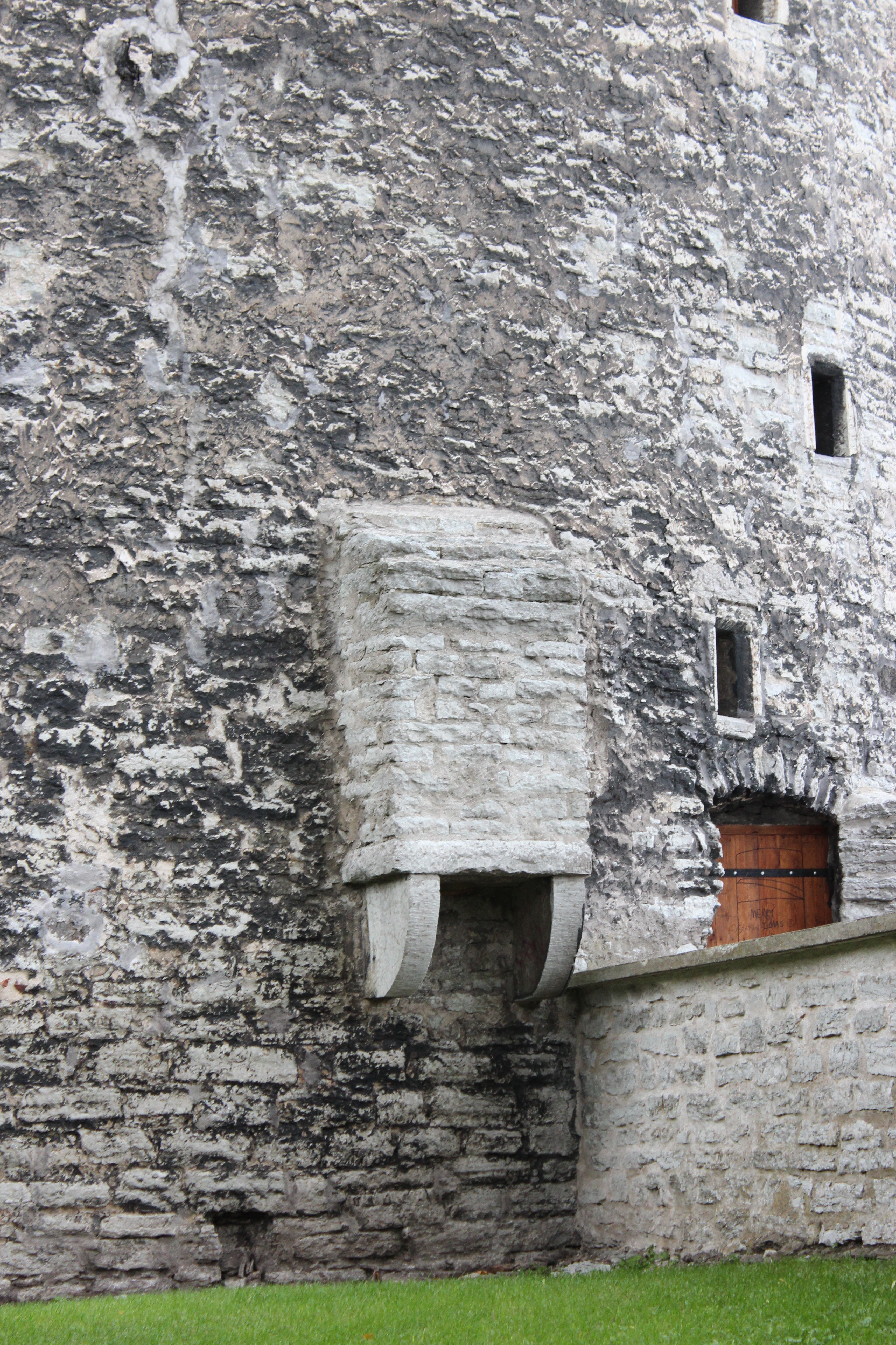 Kiek in de Köki dansker.